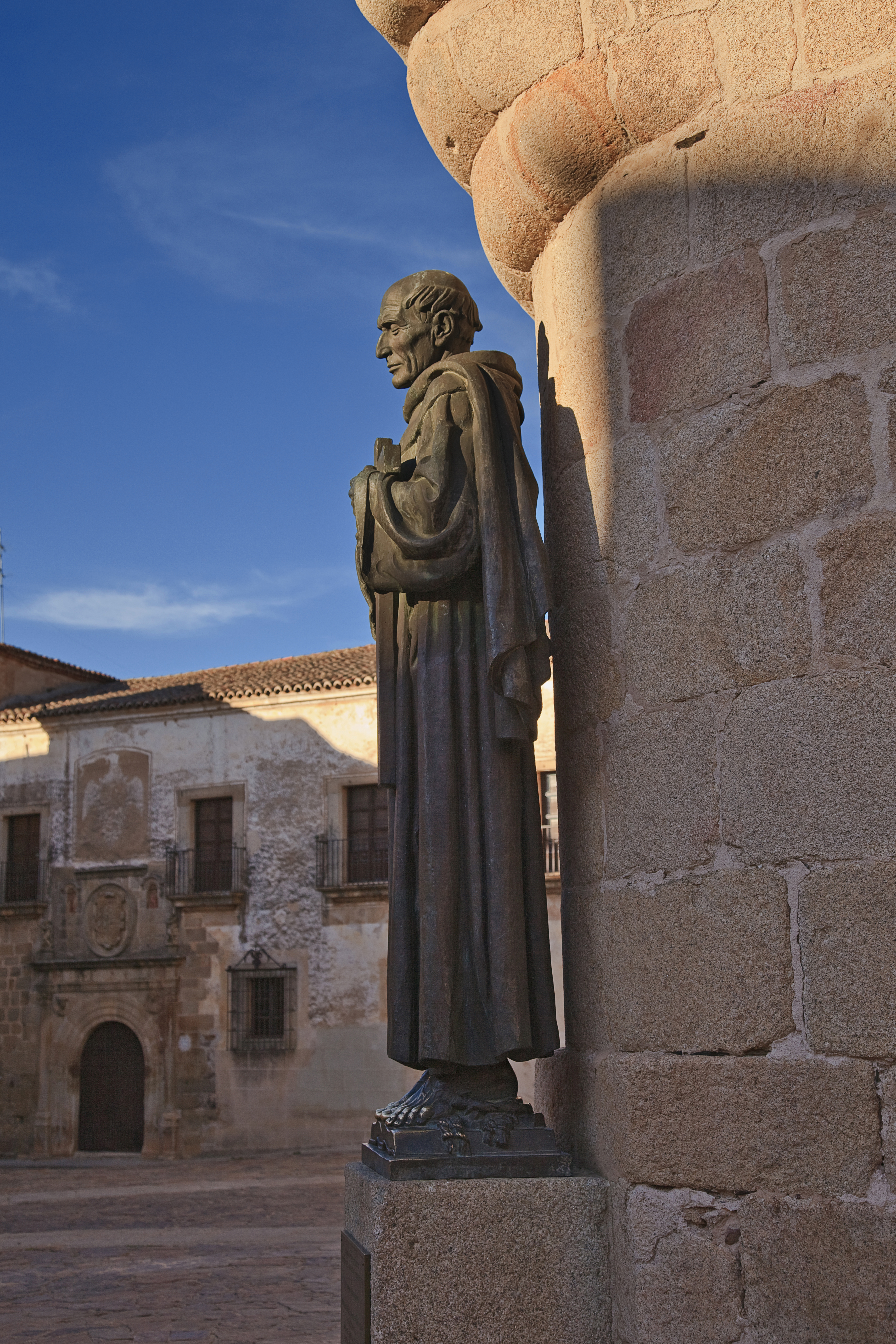 Cáceres. Statue of San Pedro de Alcántara. Santa María square. Extremadura. Spain